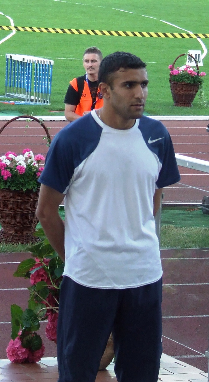 Nabil Madi, algierski biegacz (800 m), Bydgoszcz Dolcan Cup 2007